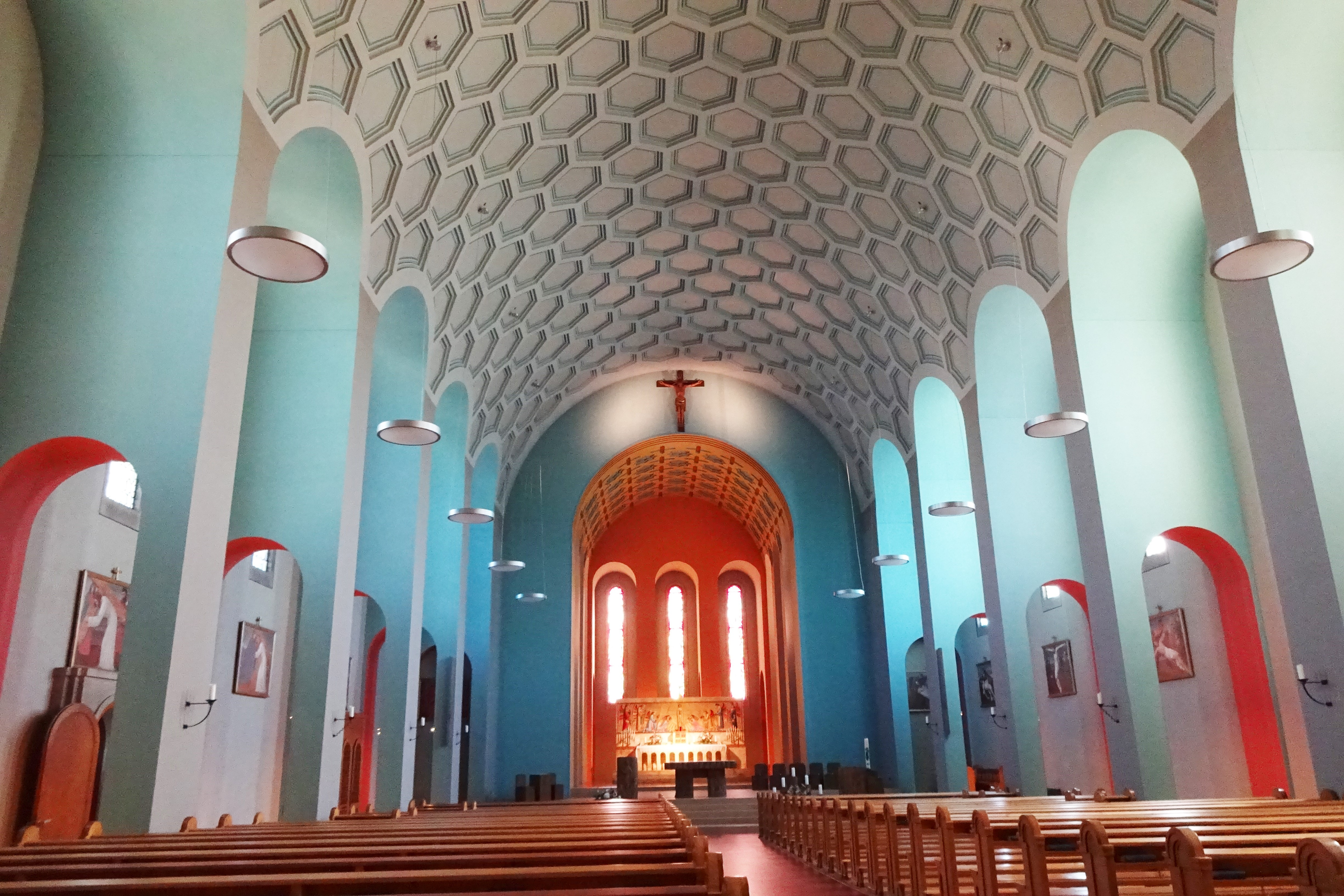 Wünnewil-Flamatt – Pfarrkirche St.Margaretha, KGS-Nr 13364 (Augustin Genoud-Eggis, 1932): Innenansicht, Blickrichtung Chor